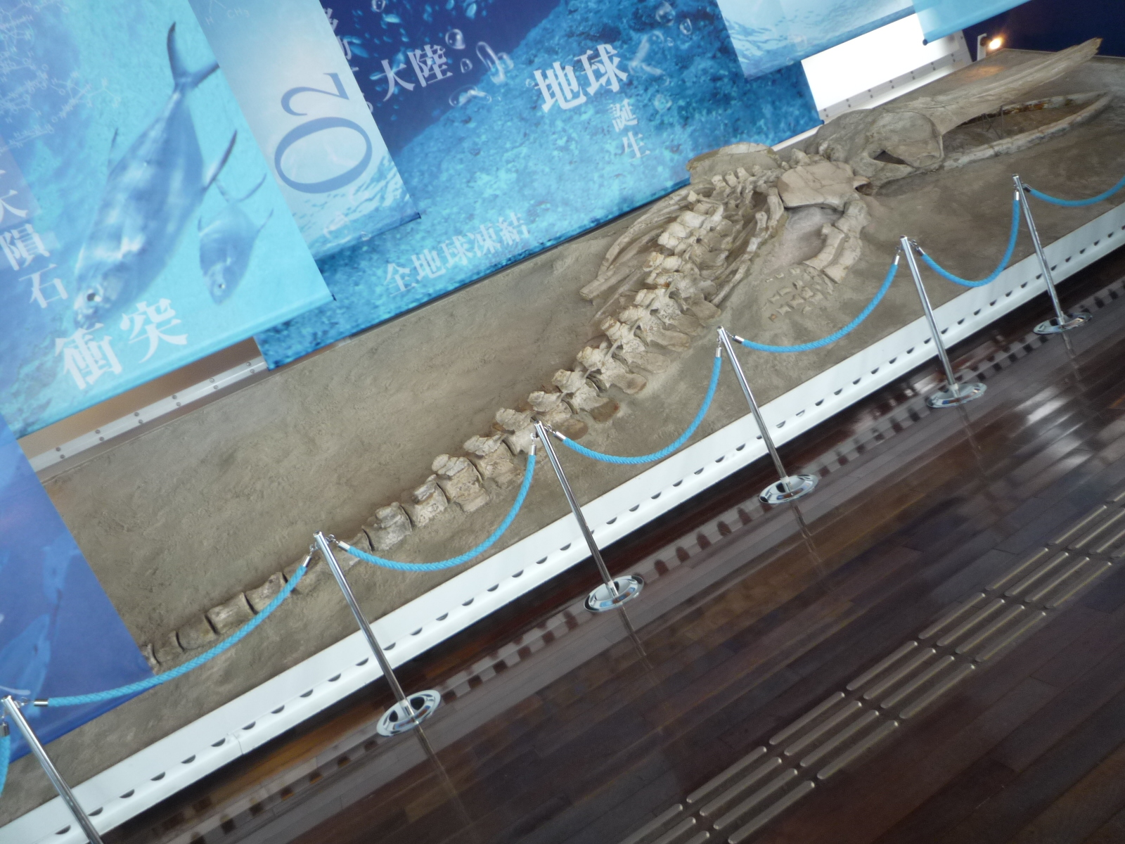 インカクジラのホロタイプ標本